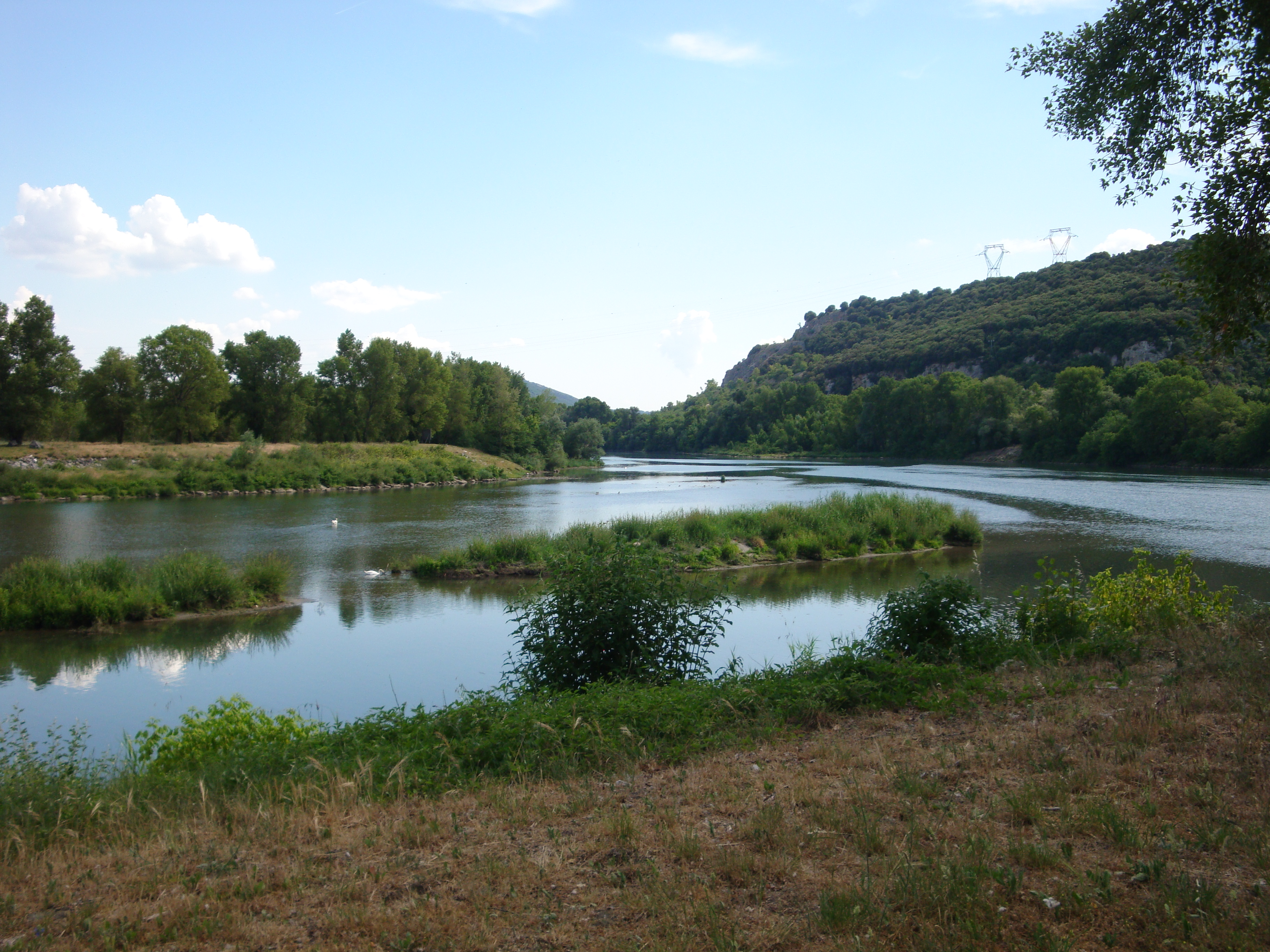 Confluence de L'Isère et du Rhône sur la commune de La Roche de Glun. La commune de Châteaubourg se trouve au niveau du Rhône et en face.